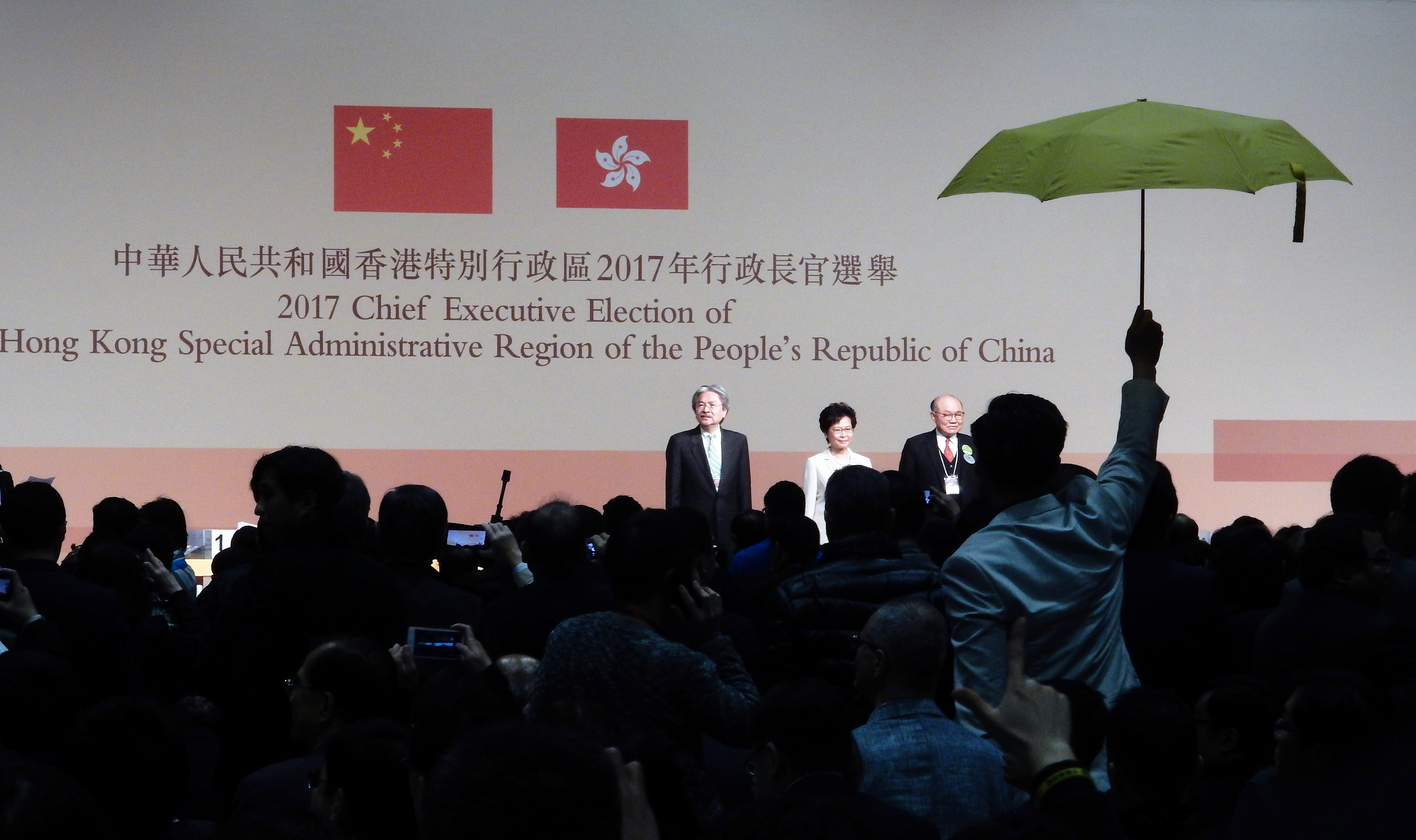 中文（香港）: 有示威者在香港特首選舉點票中心高舉代表爭取真普選的黃傘。(美國之音湯惠芸)